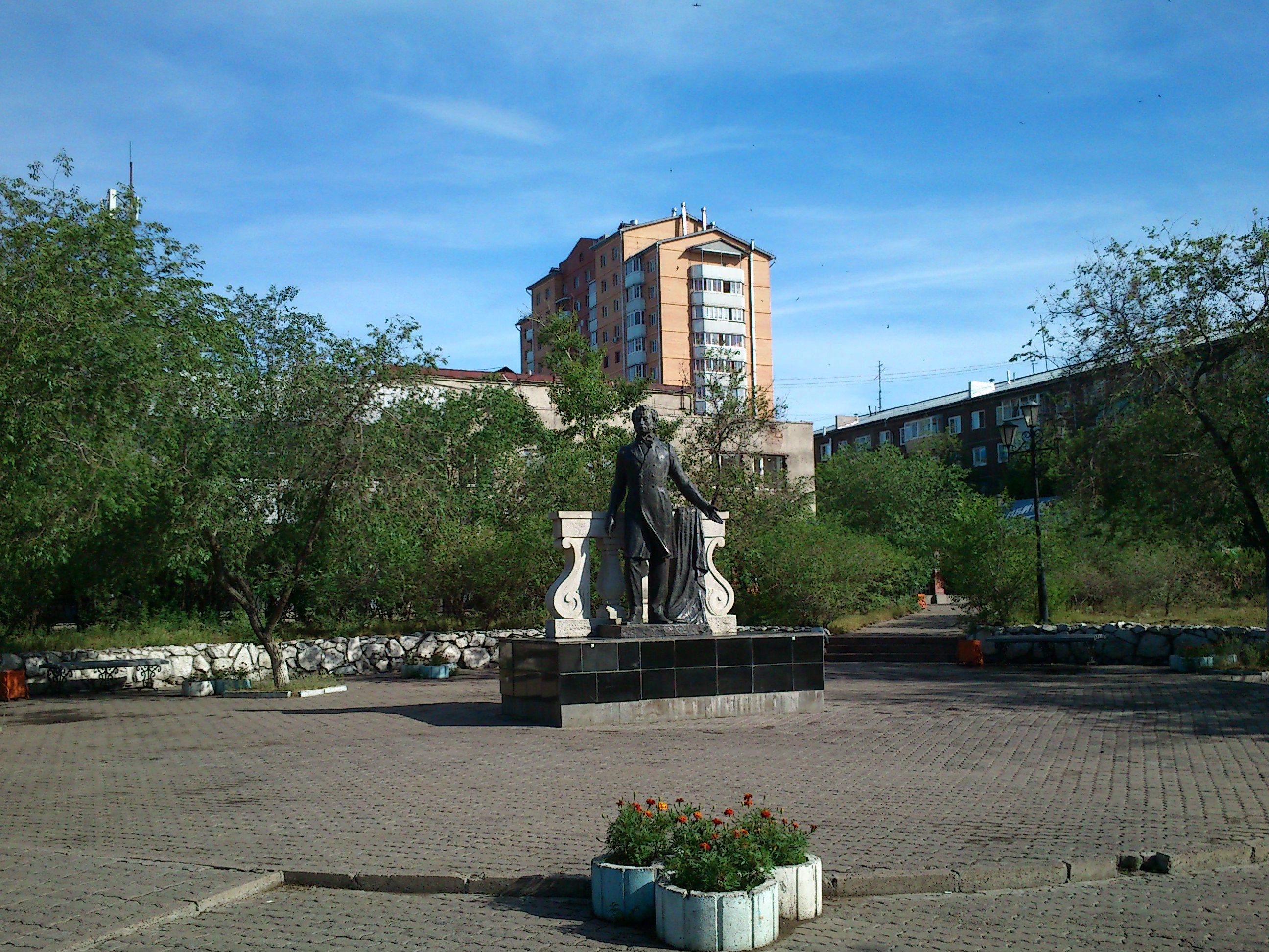 Памятник русскому поэту А.С. Пушкину